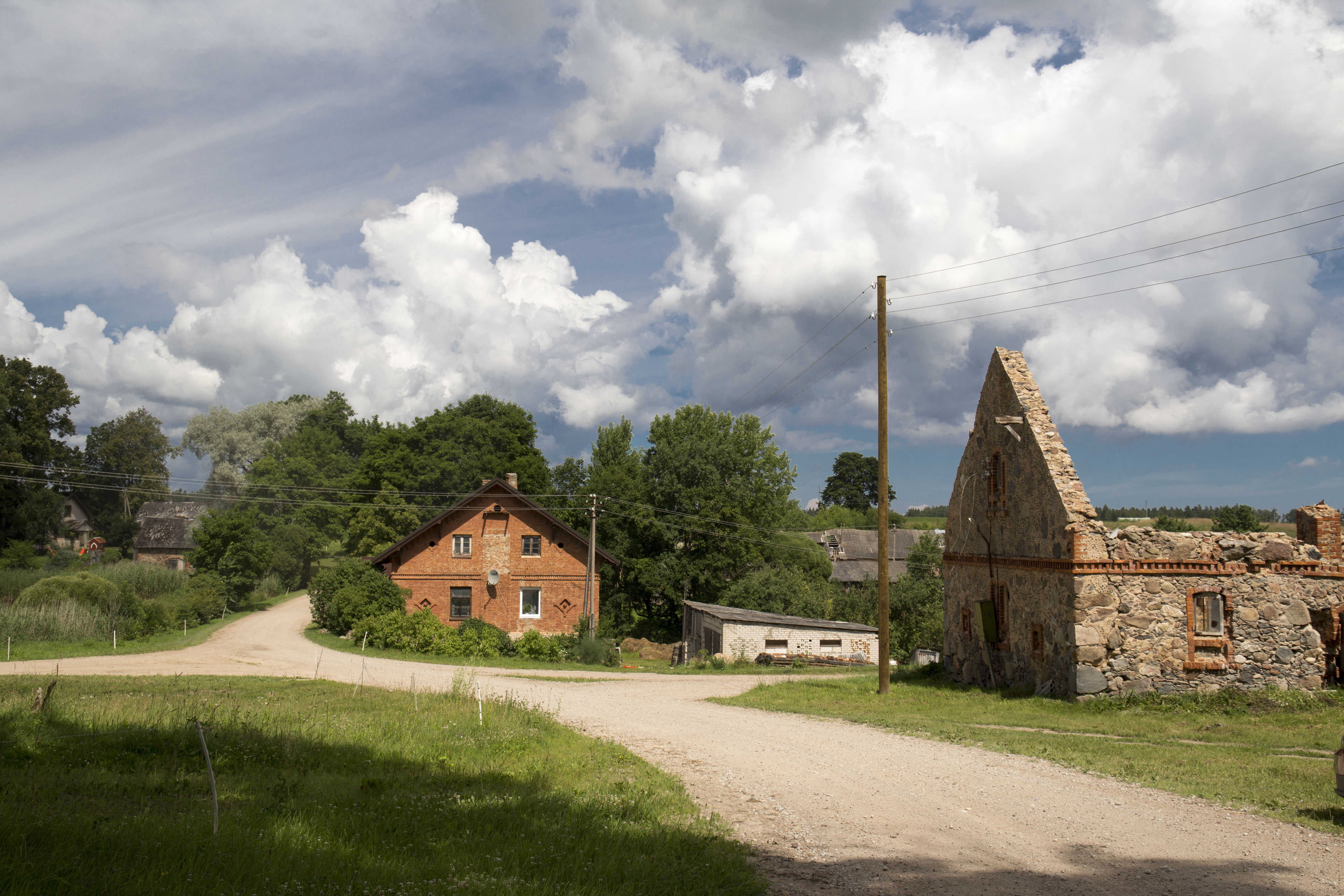 Iģene